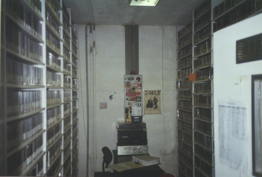 Radio flora-00